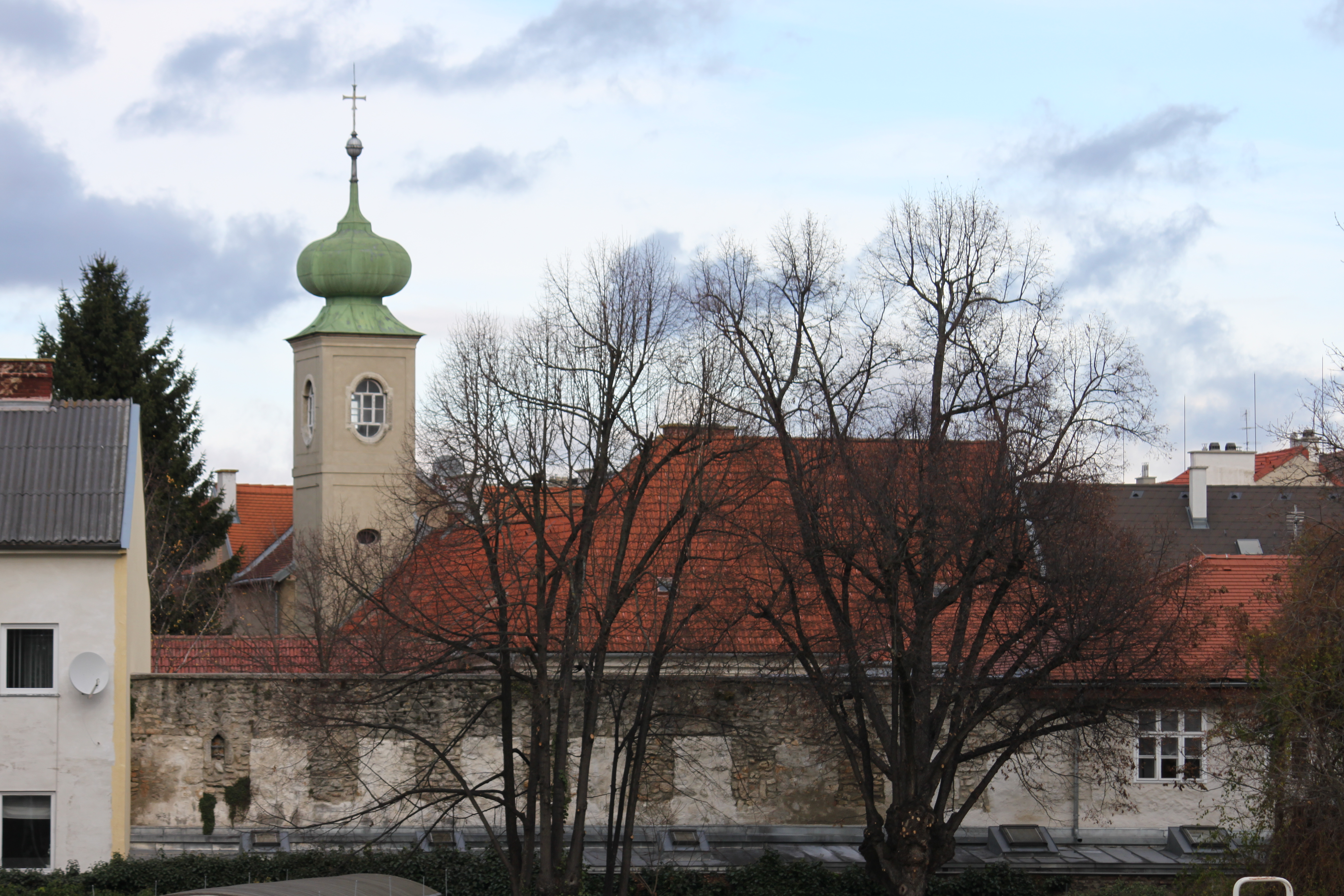 Deutschordenskommende Wiener Neustadt, Ansicht vom Stadtpark aus, davor sichtbar ist ein Rest des Stadtummauerung